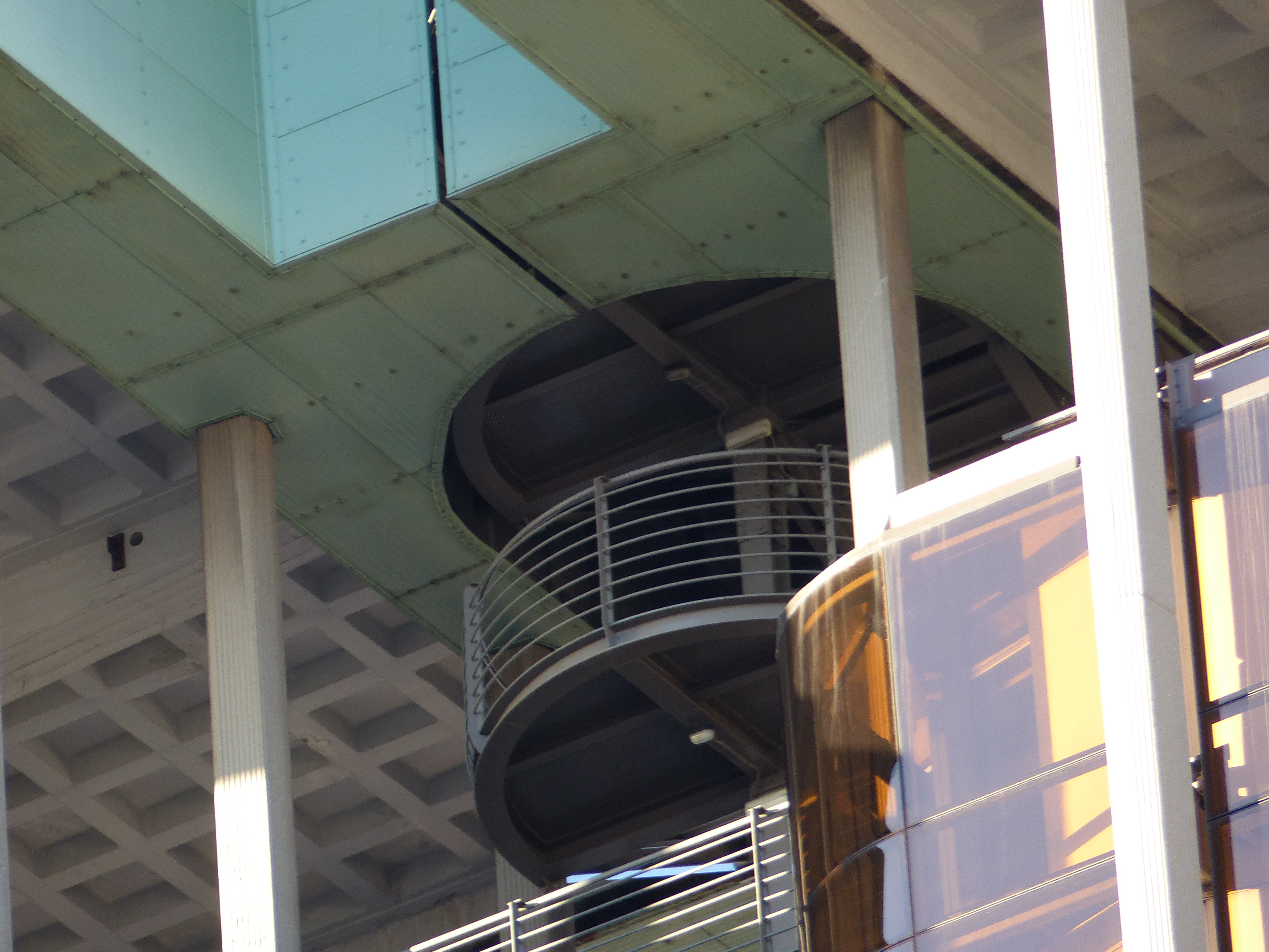 Final de la escalera de las Torres de Colón.